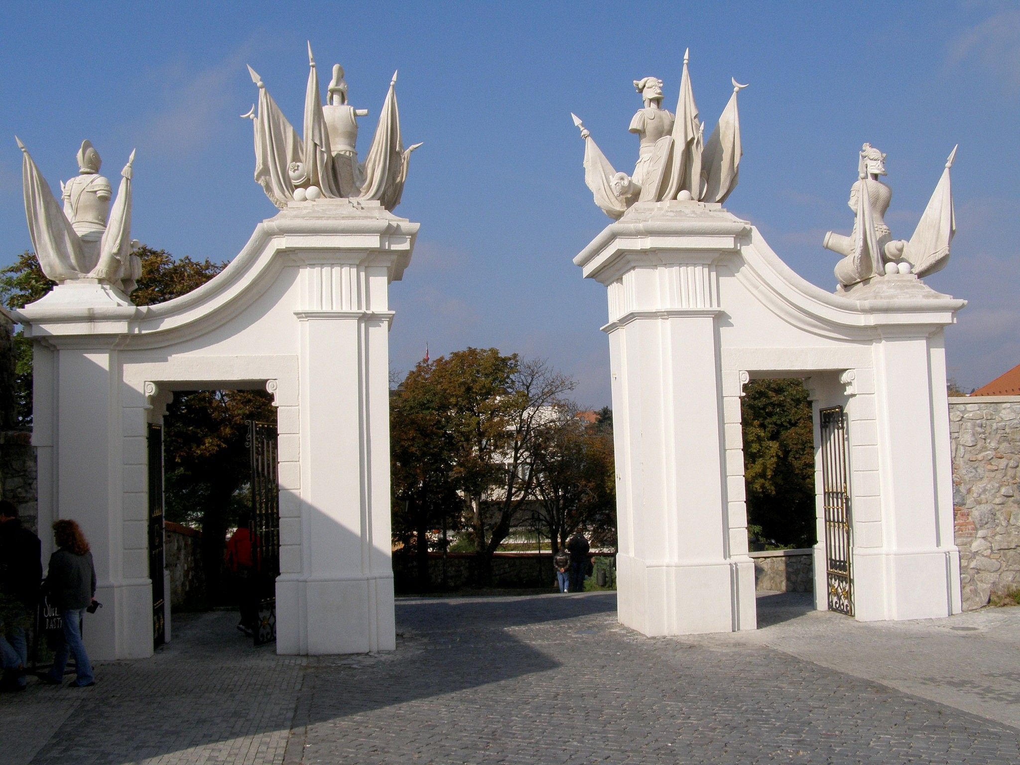 Západné tzv. víťazné brány, pochádzajúce z druhej polovice 18. storočia, sú dielom F. A. Hildebrandta. Ukončené sú kamennými trofejami This medium shows the protected monument with the number 101-28/6 in the Slovak Republic.